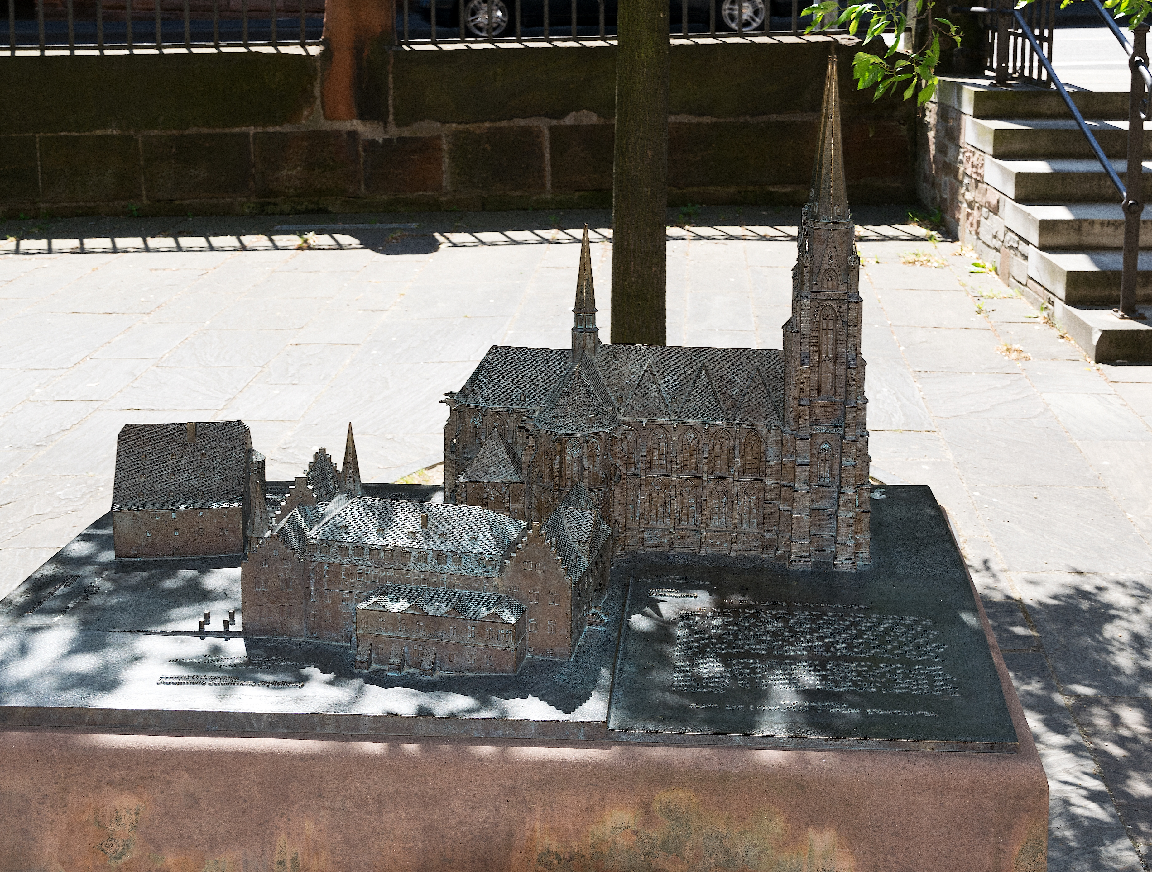 Modell der Deutschordensgebäude in Marburg. Links das Korn- und Backhaus, im Vordergrund das Deutsche Haus, rechts die Elisabethkirche.